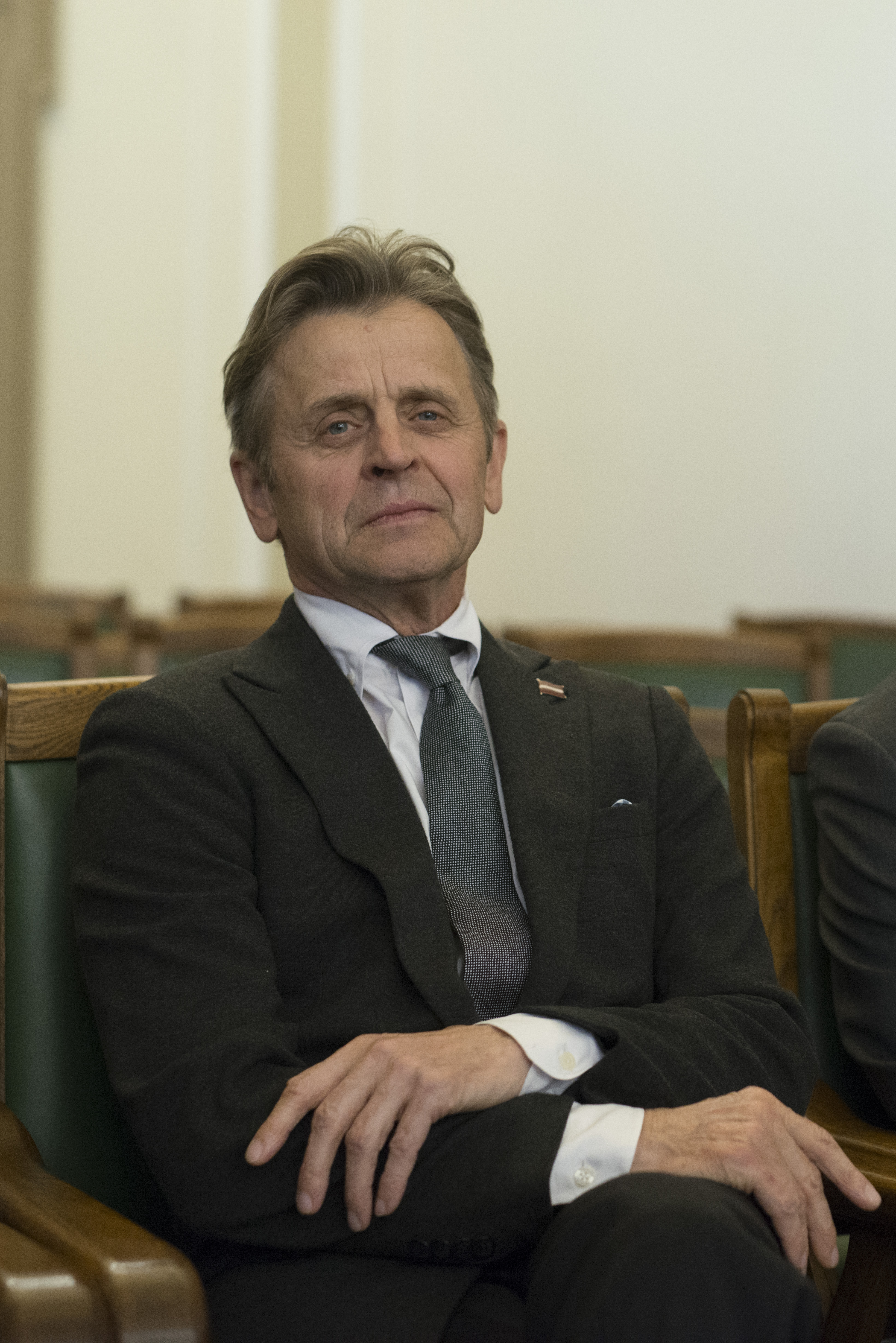 2017.gada 27.aprīlis. Darbs Saeimas sēdē. Foto: Reinis Inkēns, Saeimas Administrācija Izmantošanas noteikumi: saeima.lv/lv/autortiesibas